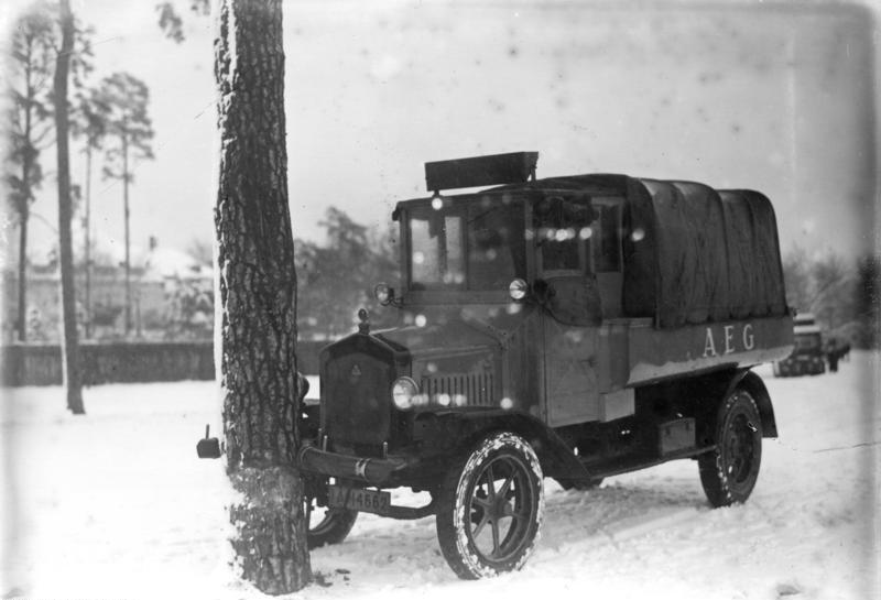 Im 40 km Tempo gegen einen Baum, ohne dabei Schaden zu erleiden! Interessante Versuche mit dem neuen Casco-Puffer für Last- und Personen-Kraftwagen, um die größtmöglichste Sicherheit bei evtl. Zusammenstössen zu prüfen. Ein mit dem Casco-Puffer ausgestatteter Lastkraftwagen, fährt im 40 km Tempo gegen einen Baum .